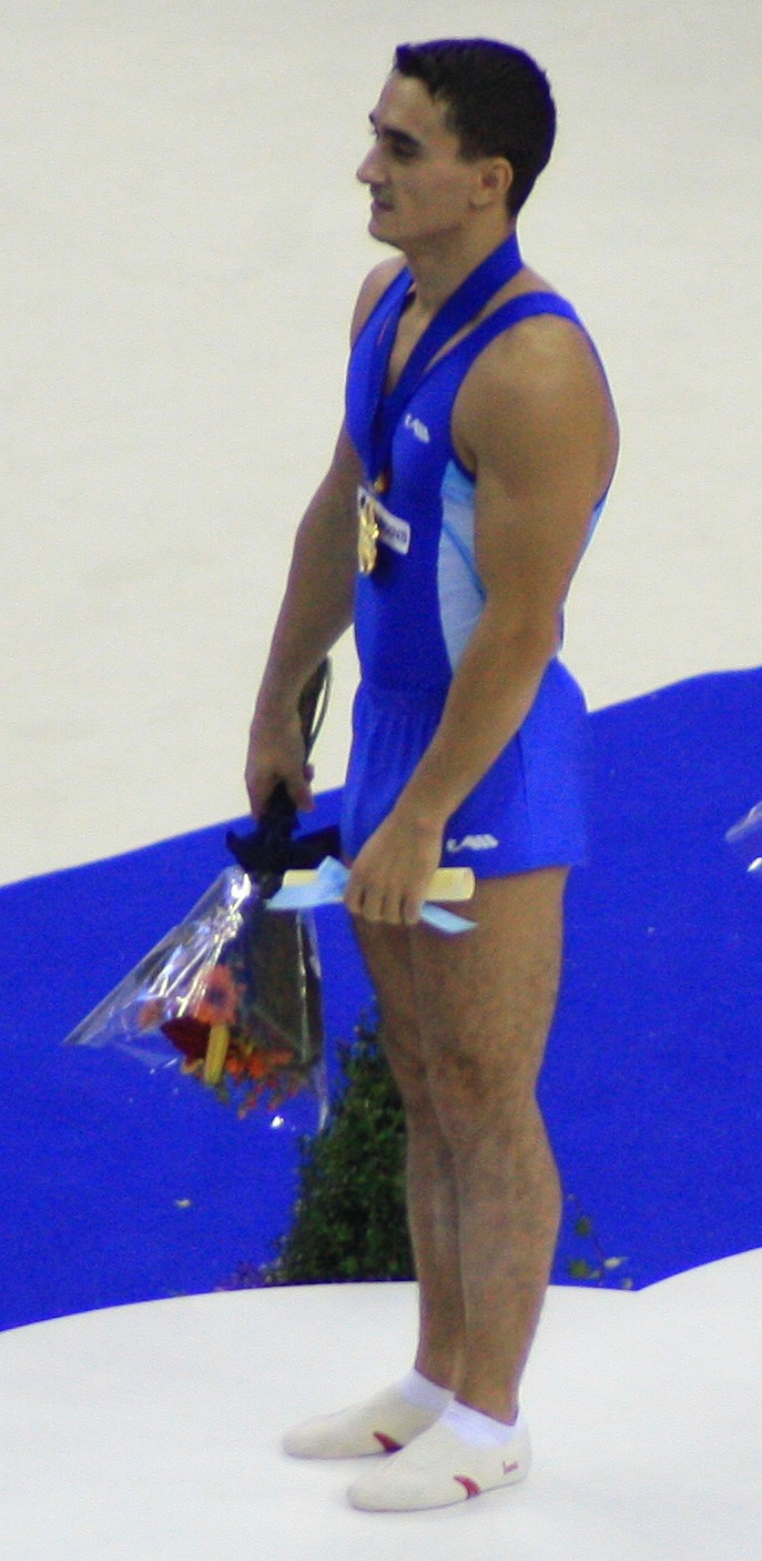 Marian Dragulescu, vencedor da prova do solo, no pódio